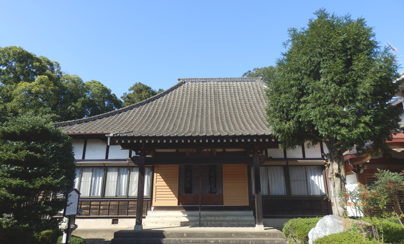 本堂。2014年撮影